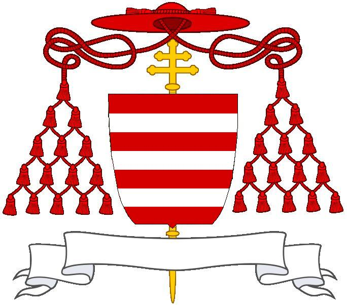 (autore Borgosiepi, Stemma Cardinale Oliviero Carafa. Fonte: Chiesa Collegiata Santa Maria Maggiore Corpo di Cava-Cava de' Tirreni)